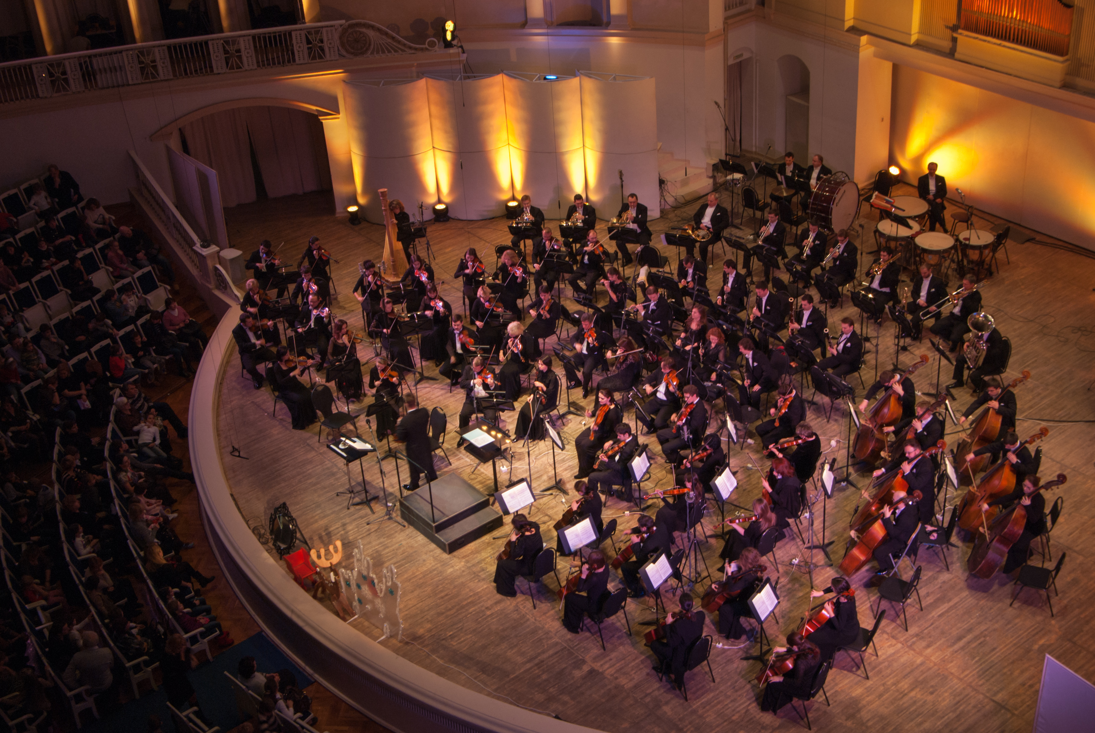 اجرای ارکستر آکادمیک ارکستر فیلارمونیک مسکو در سالن کنسرت پ.ا چایکوفسکی ، ژانویه 2013